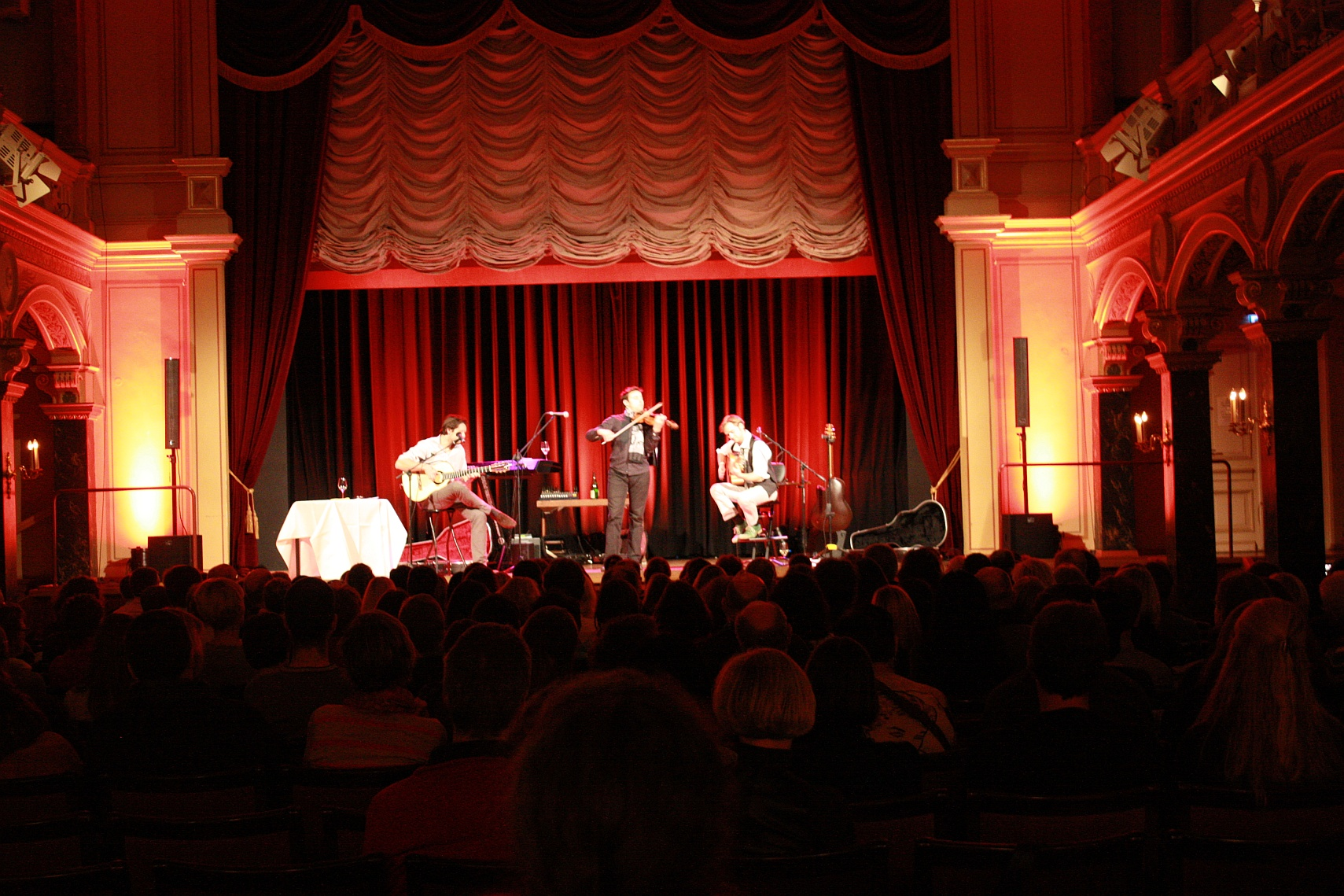 Deitsch: Konzert in der Musikhalle Ludwigsburg am 05. Dezember 2013